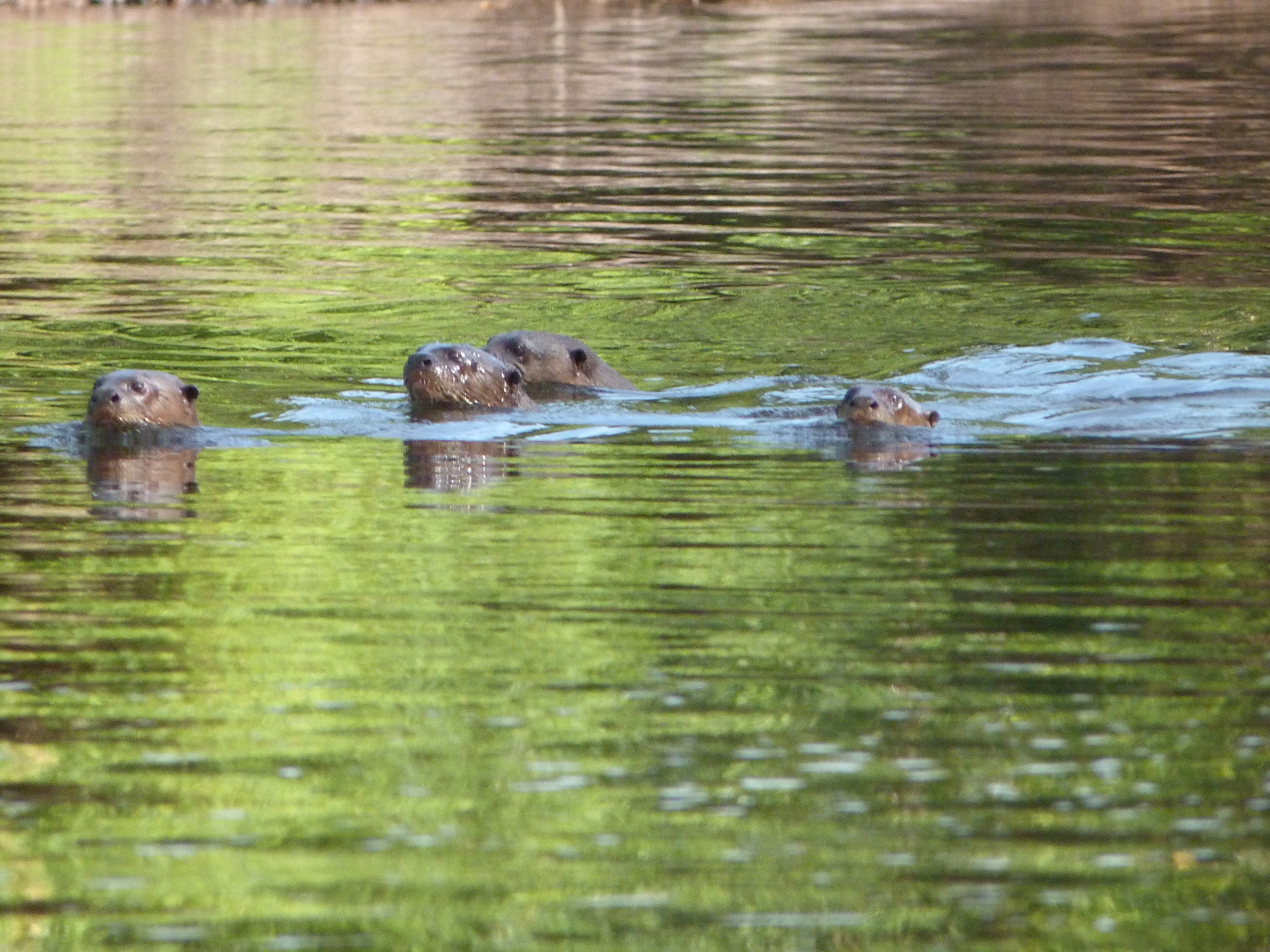 Mamíferos aquáticos amazônicos